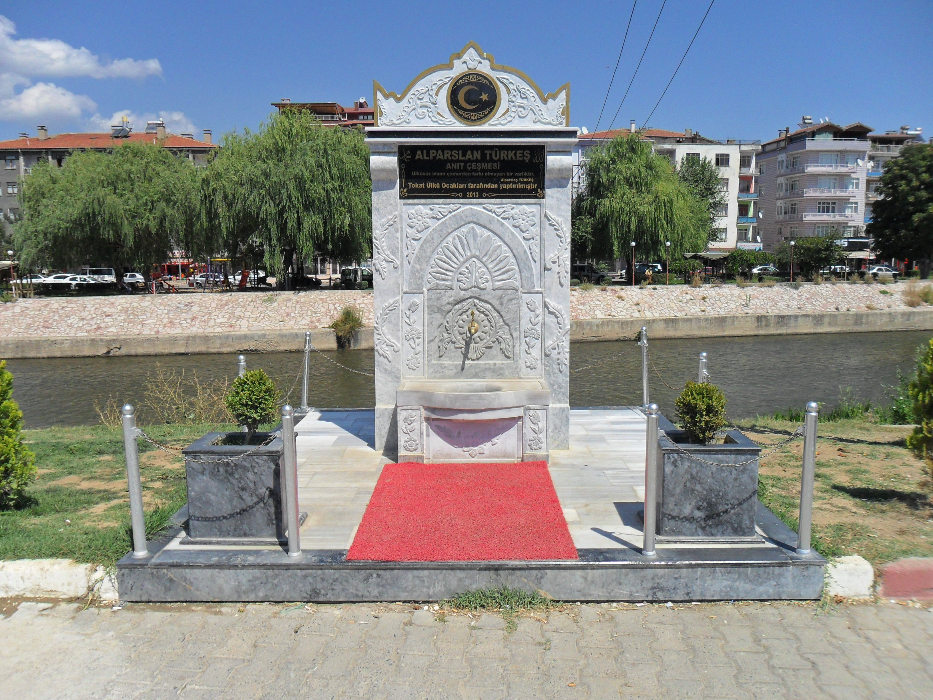 Tokat merkezde yer alan Alparslan Türkeş anıt çeşmesi.